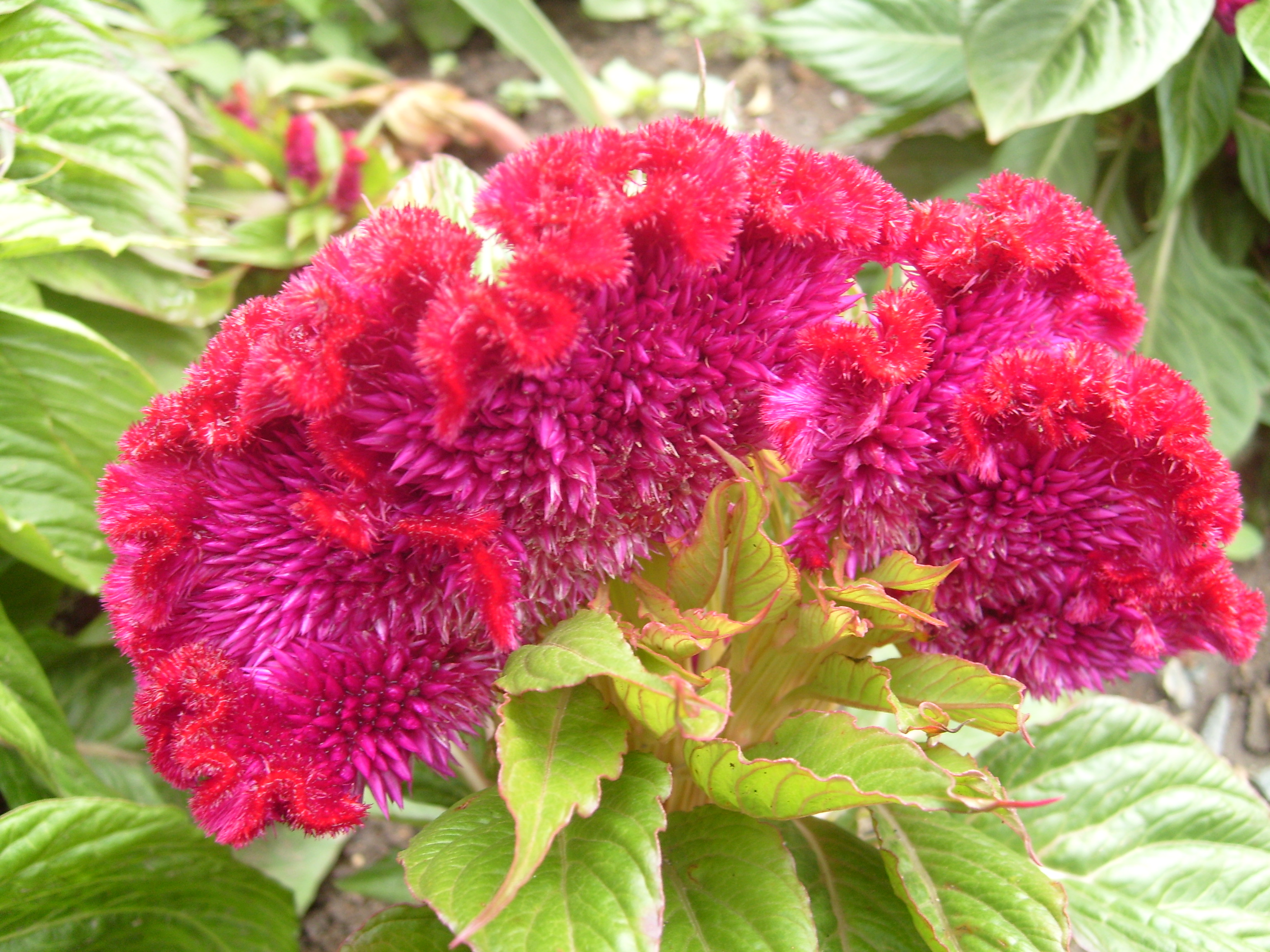 Nevadlec hřebenitý (Celosia argentea var.cristata)